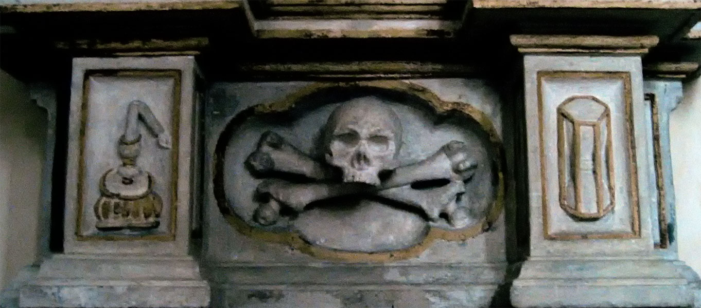 Vanitas: Epitaph in church Maria Trost in Fernitz (Austria) - Baroque style; Vanitas-Motive erlöschende Kerze, Sanduhr, Totenschädel auf einem Grabstein in der Wallfahrtskirche Maria Trost in Fernitz, Steiermark, Österreich